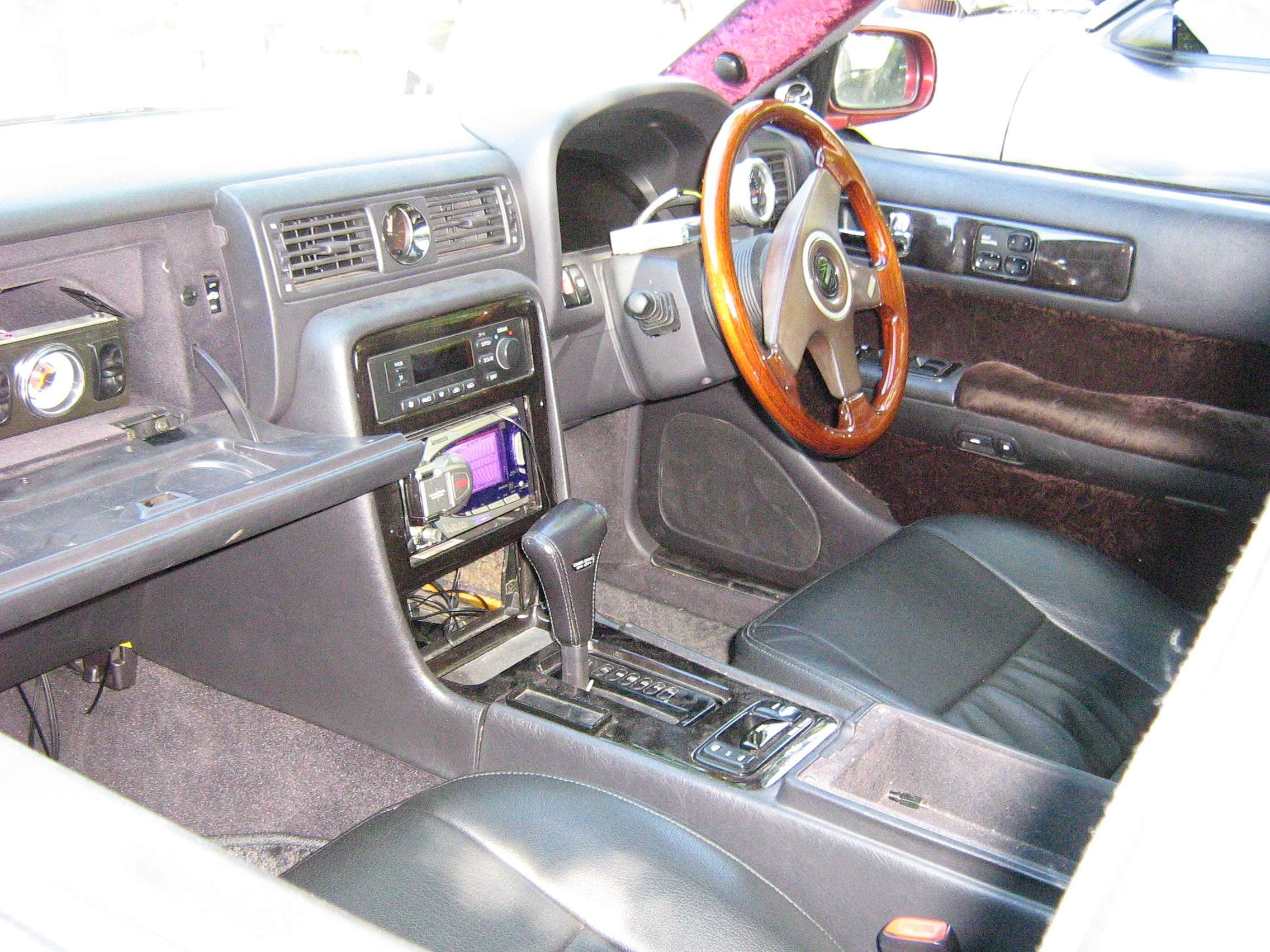 1992 Nissan Gloria GT